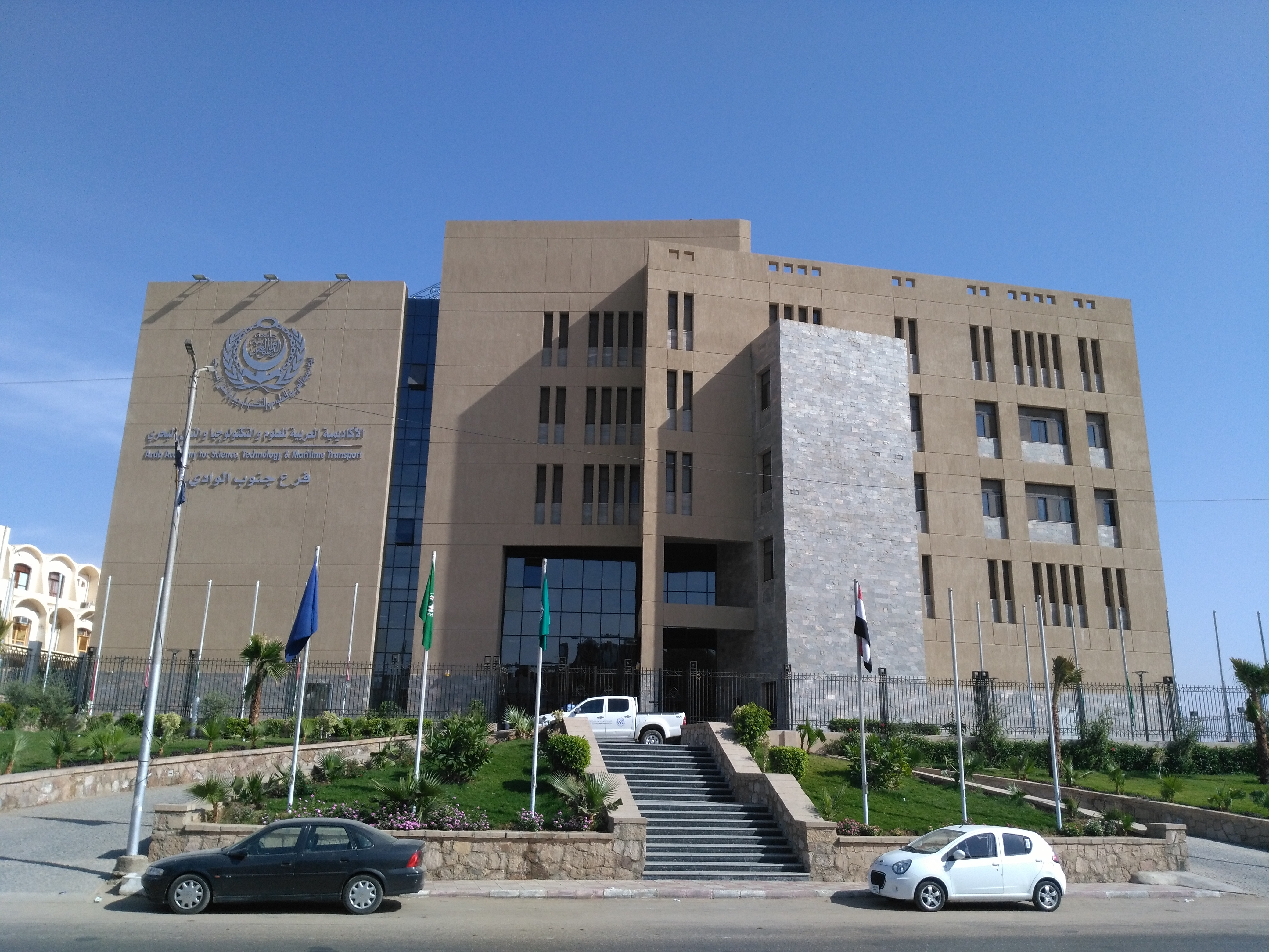 Arab Academy for Science,Technology&Maritime Transport-AASTMT